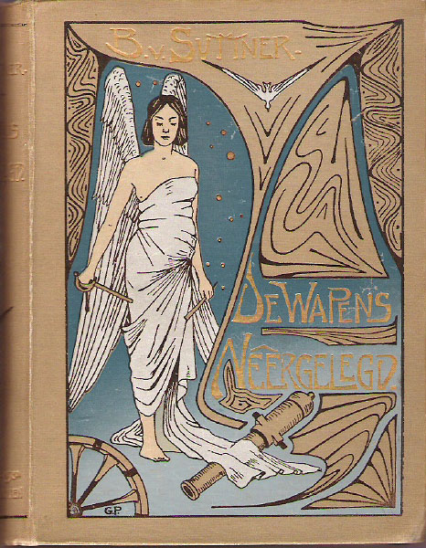 boekbandontwerp van Gust van der Wall Perné